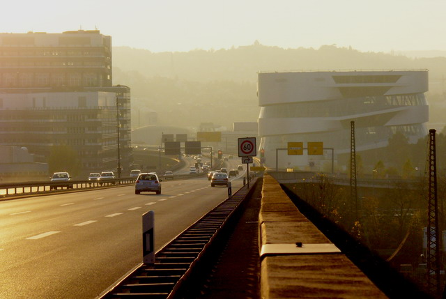 Neckartalviadukt Stuttgart mit Mercedes-Benz Museum Selbst fotografiert am 13.11.2005 von user:Enslin